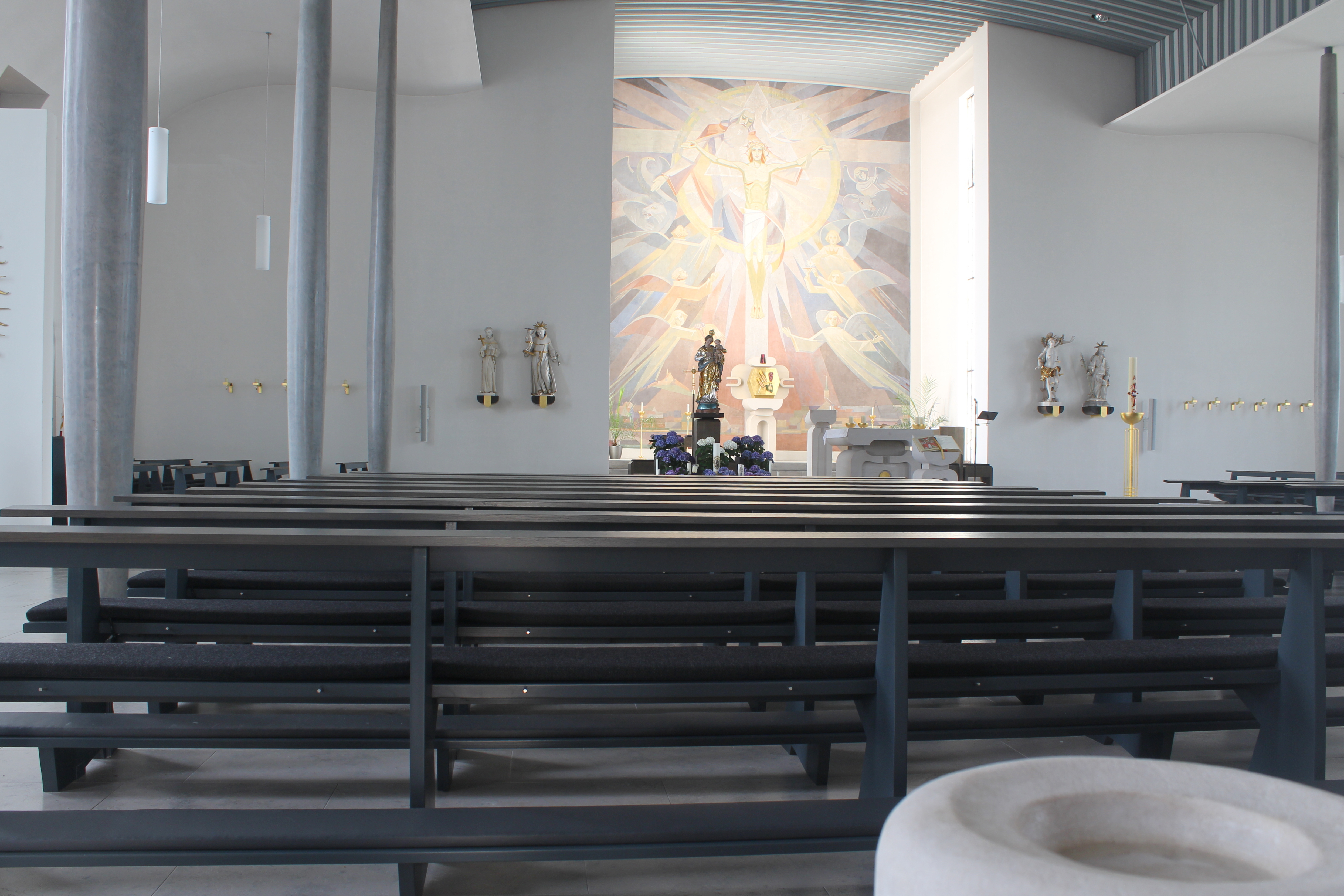 Sankt Michael Heustreu, Blick zum Altar